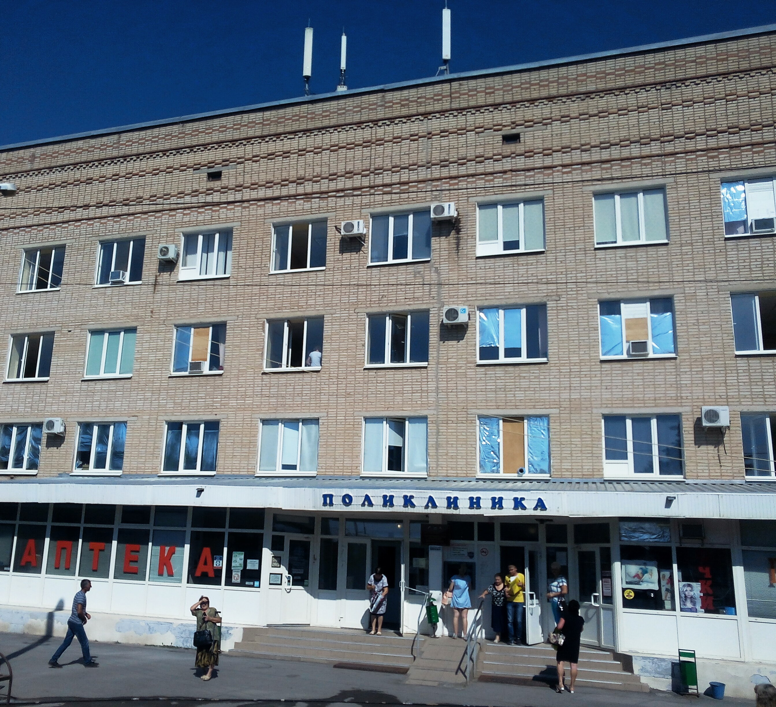 г. Сальск,ул. Павлова, 2А, поликлиника для взрослых